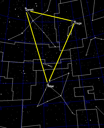 משולש הקיץ